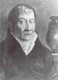 Josef Hardtmuth (1758 - 1816), Rakouský architekt, vynálezce a průmyslník.